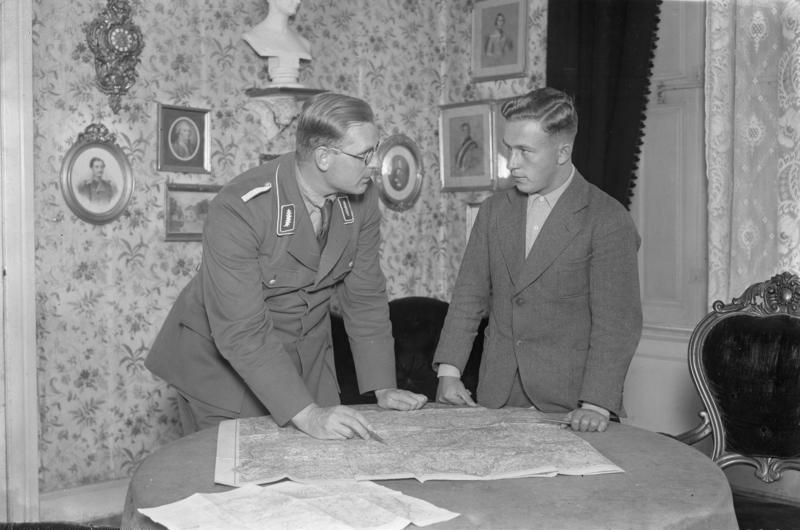 Harnekop: SA Führerschule: Schulführer Merker und Köppen